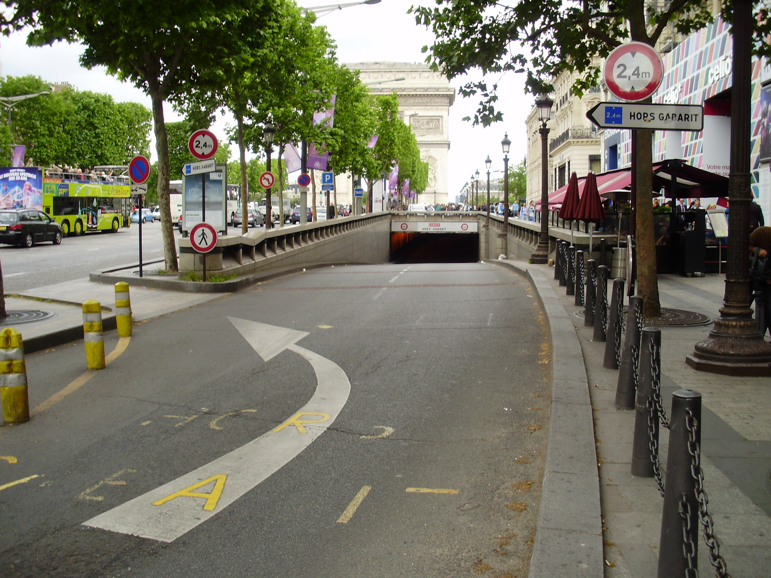 Tunnel de l'Étoile, à Paris (8e), France : entrée du tunnel reliant l'avenue des Champs-Élysées (8e) à l'avenue de la Grande-Armée (17e), en passant sous la place Charles-de-Gaulle et l'arc de triomphe de l'Étoile.